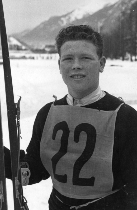 Norwegian ski jumper Arnholdt Kongsgård at the Olympics in Garmisch-Partenkirchen